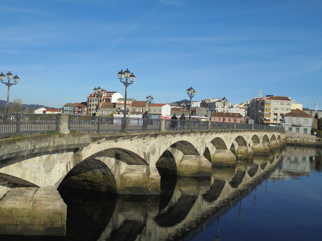 Puente del Burgo en Pontevedra Capital